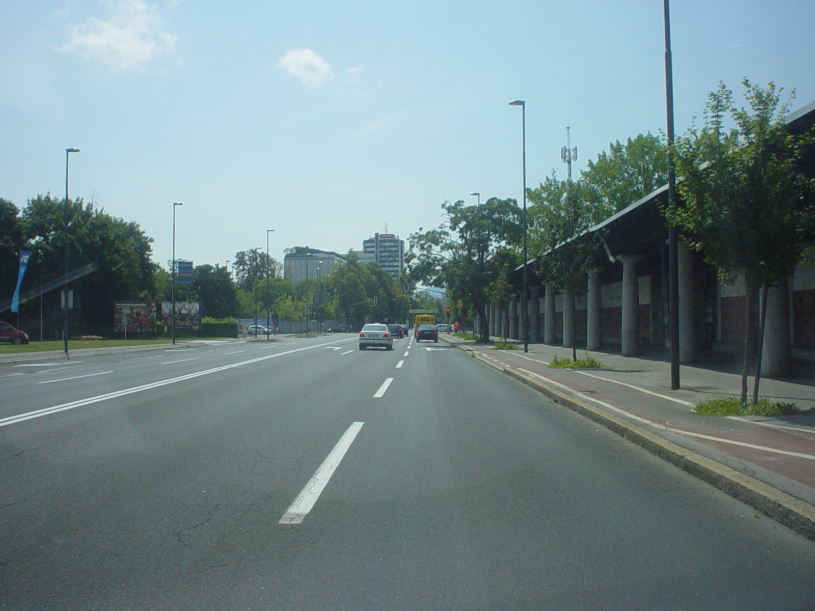 Dunajska cesta, Ljubljana.